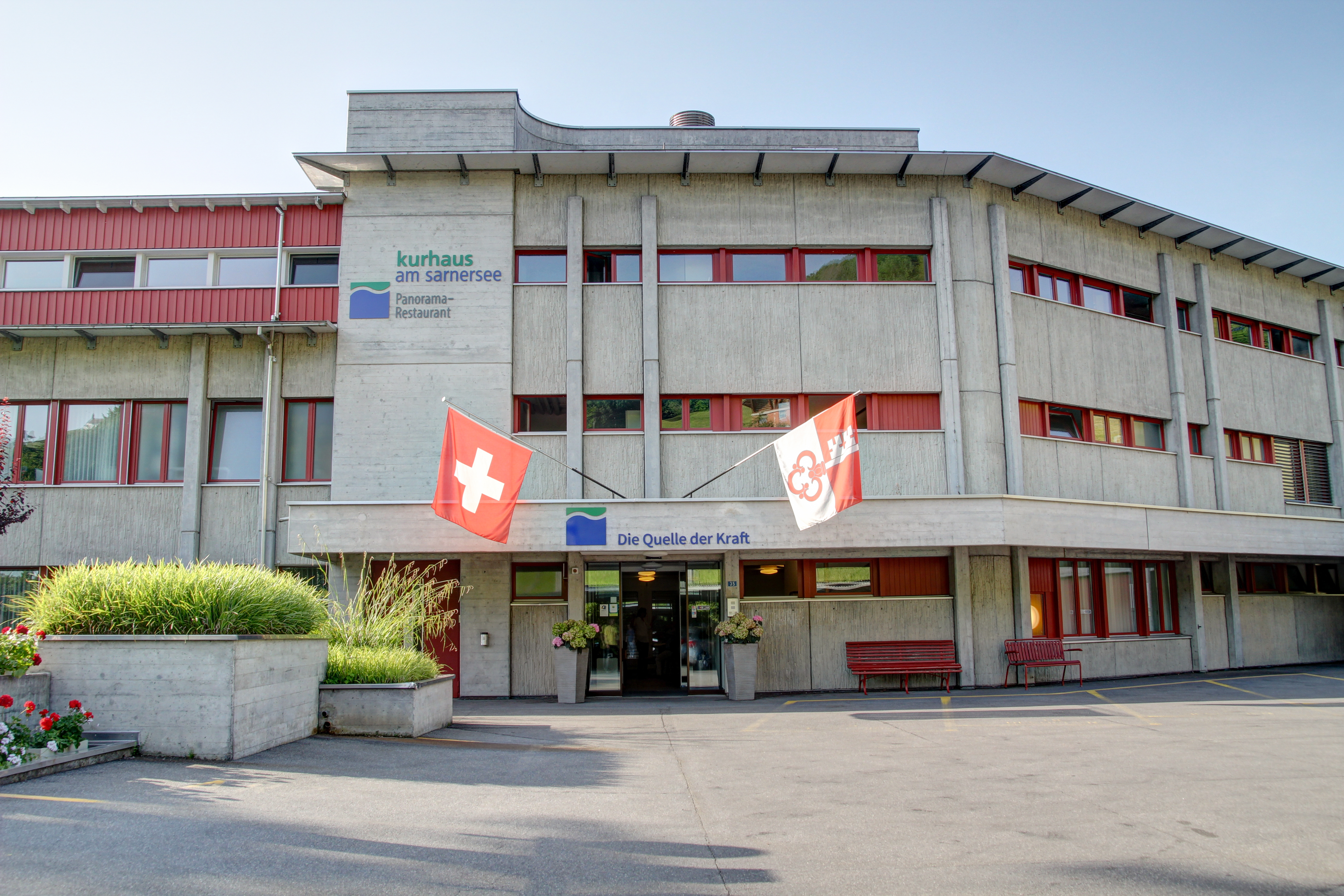 Eingang des Hotels Kurhaus am Sarnersee.